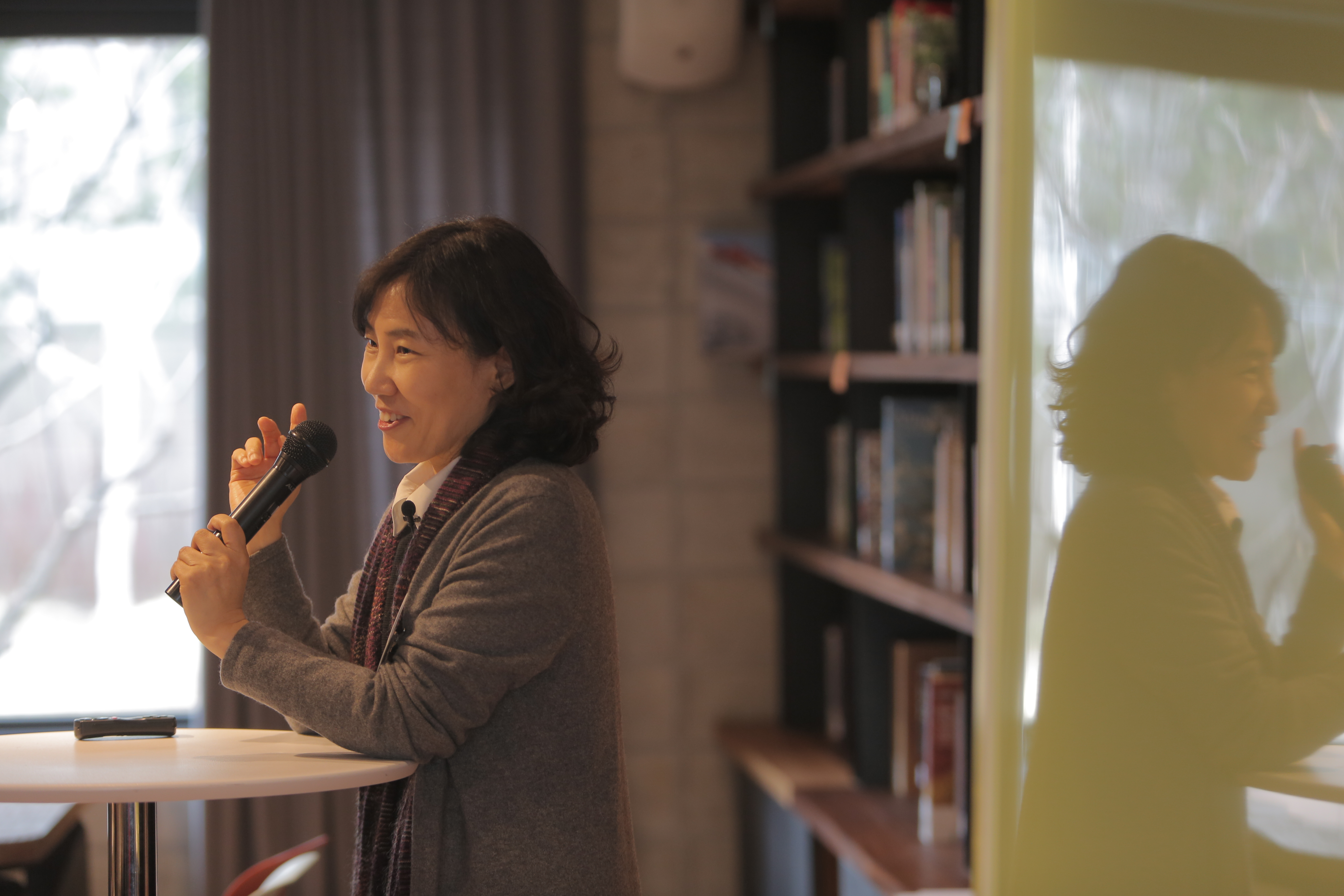 콘퍼런스 위기 2015에서 여지영이 강연을 하고 있다.